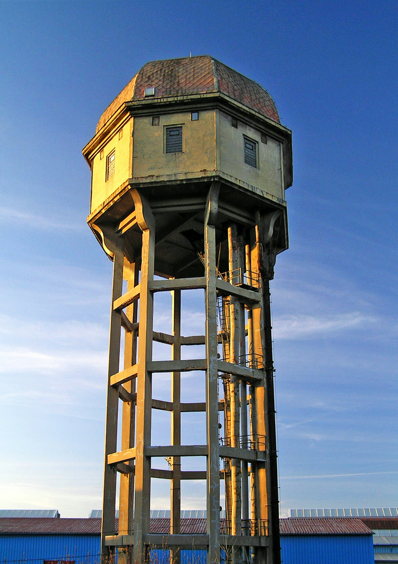 Sklárna Splintex, z toho jen: Věžový vodojem (Chudeřice), Chudeřice (Bílina).